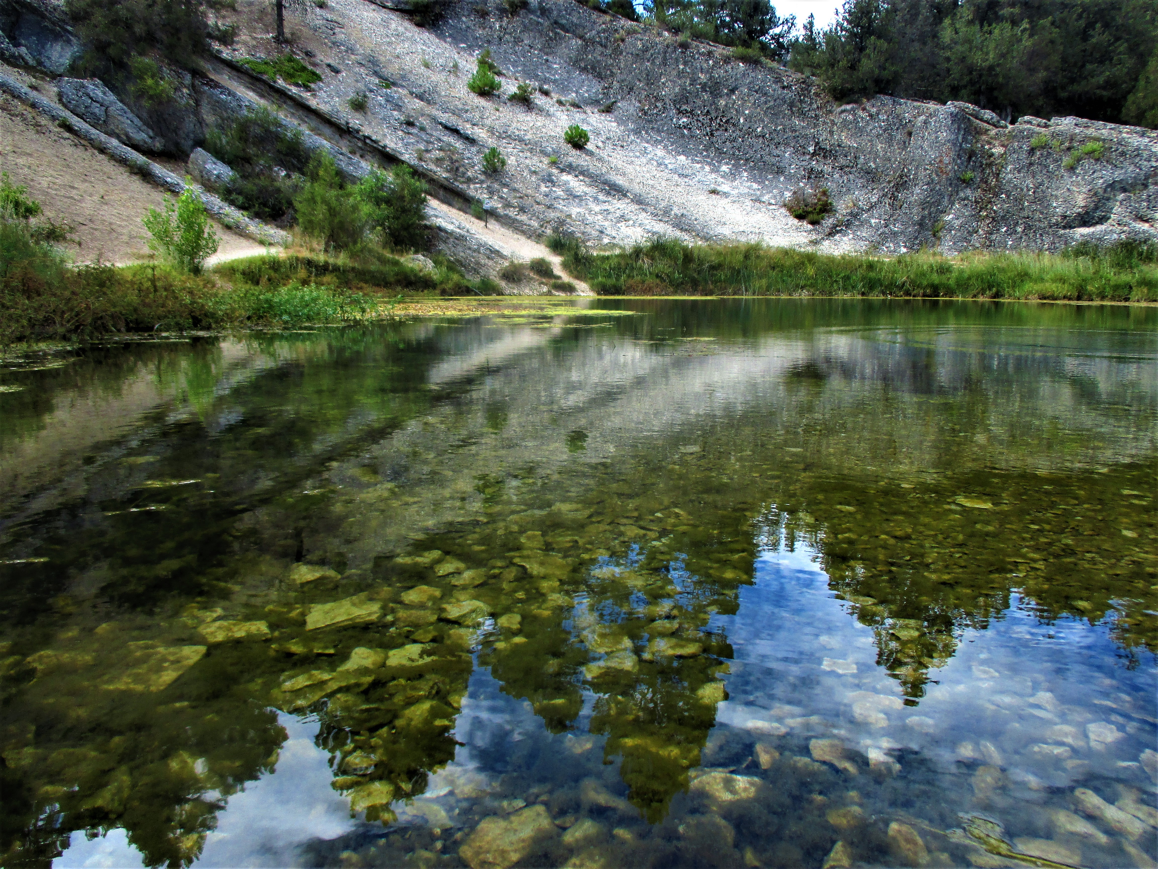 Sabinares Sierra de Cabrejas. La Fuentona de Muriel es una laguna de origen karstico que acoge gran variedad de flora acuatica y anfibia, y especies animales en peligro como el cangrejo de rio. Rodeada de sabinas, pinos, y cerca del agua fresnos y sauces, acoge jabalies, zorros, buitres leonados, halcones y buhos. This is a photography of a Special Area of Conservation in Spain with the ID: ES4170029. Natura2000 entry, EEA entry